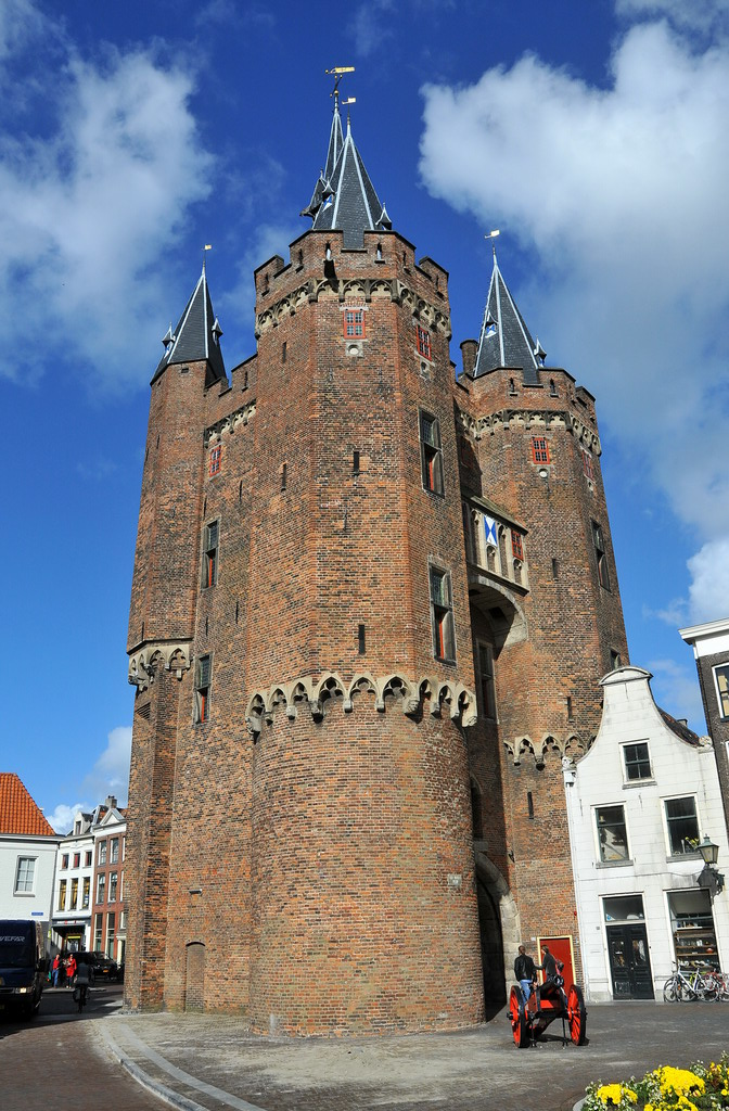 Sassenpoort in Zwolle. Middeleeuwse stadspoort uit 14e eeuw. Neogotische spits met klokkentoren is tussen 1894 en 1898 aangebracht.